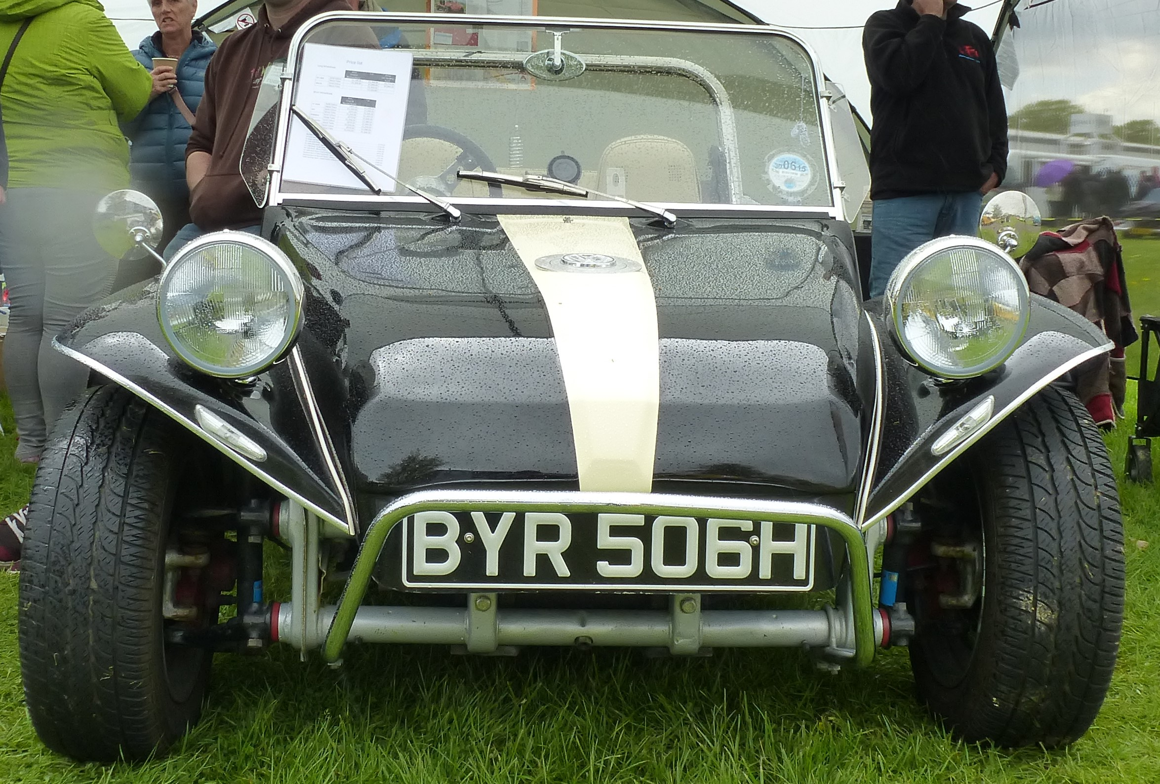 FF Buggy